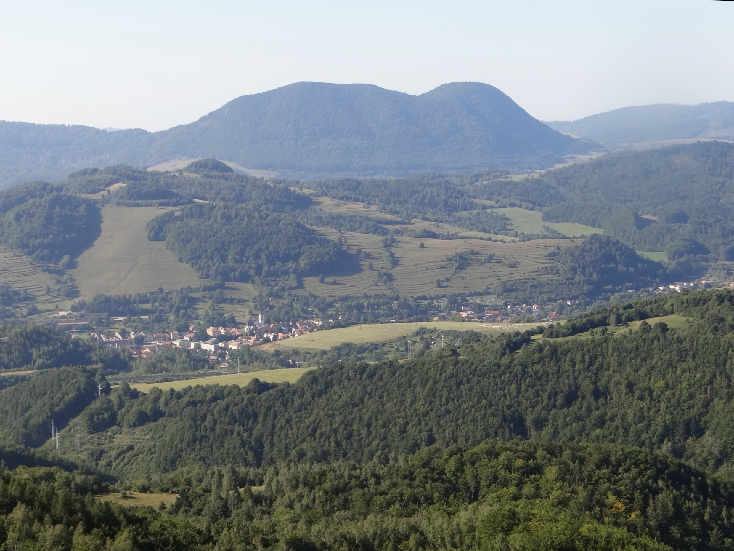 Veľký Radzim. View from Dobšinský kopec